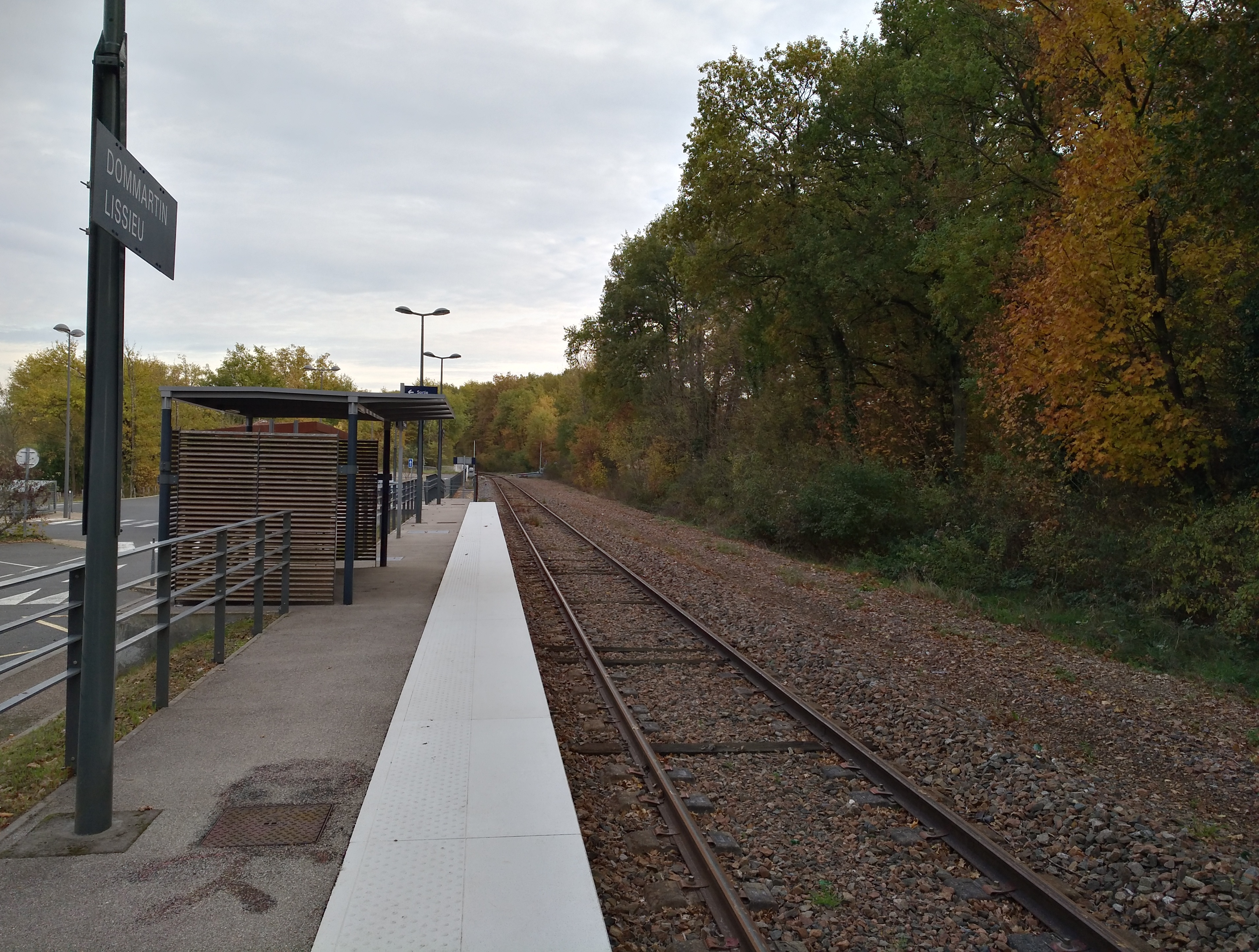 Gare de Dommartin - Lissieu, sur la commune de Lissieu (métropole de Lyon, France).